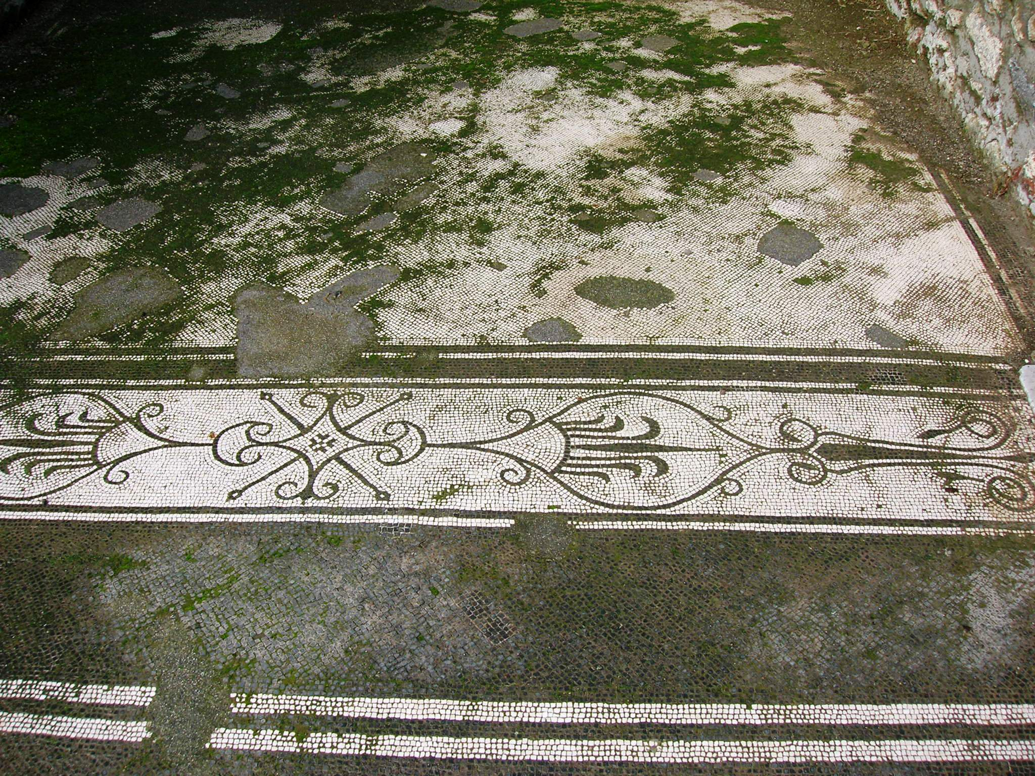 Casa di Cecilio Giocondo